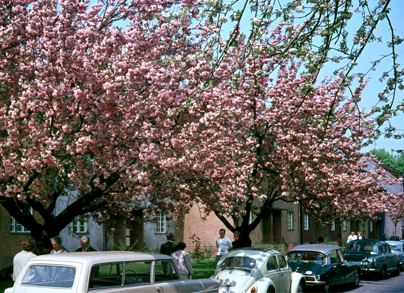 Britzer Baumblüte 1966